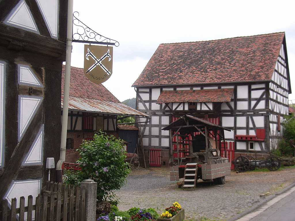 Forsthaus und Hofanlage von 1750, Wetter-Oberrosphe, genutzt als Heimatmuseum